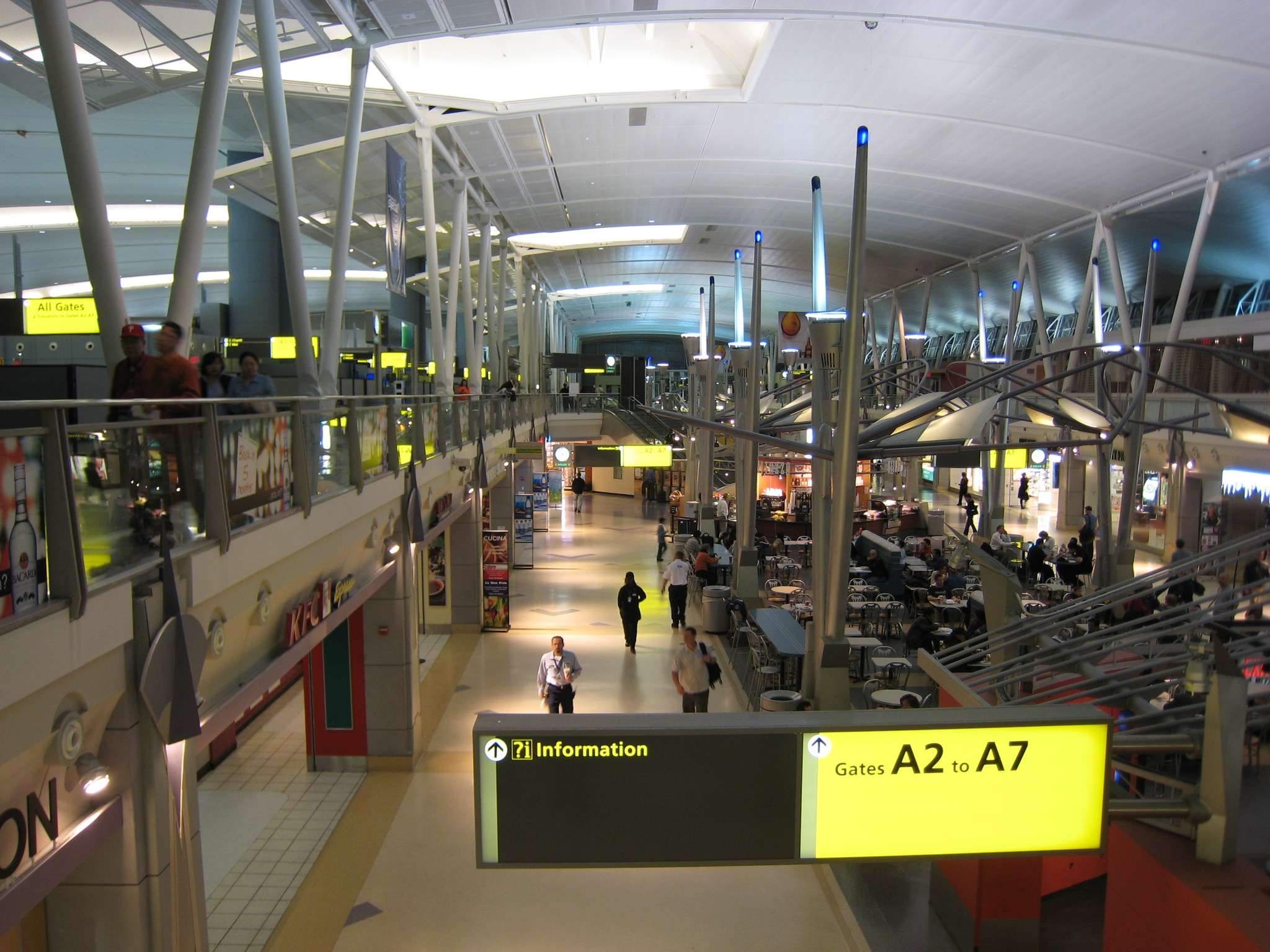 Panel de información de una de las terminales del aeropuerto JFK de Nueva York